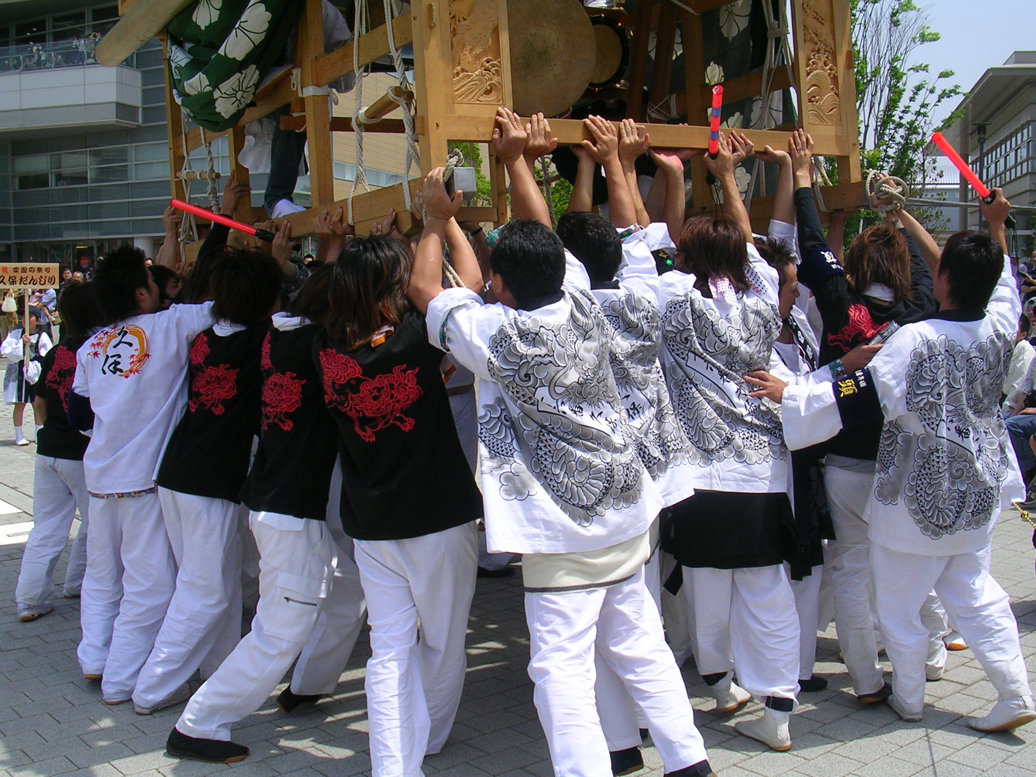 愛媛県 西条市 の祭礼「西条祭り」の楽車（だんじり）による 「 差し上げ 」の様子。 見せ場となる場面に来ると太鼓の連打ちの合図でだんじりを台輪(屋台の基部)の 最も低い部分まで持ち上げ肩にかついで舁く。 これをさらに手で持ち上げて可能な限り高く持ち上げて舁くことを 「 手差し 」と呼び、これがもっとも粋な差し上げであるとされている。